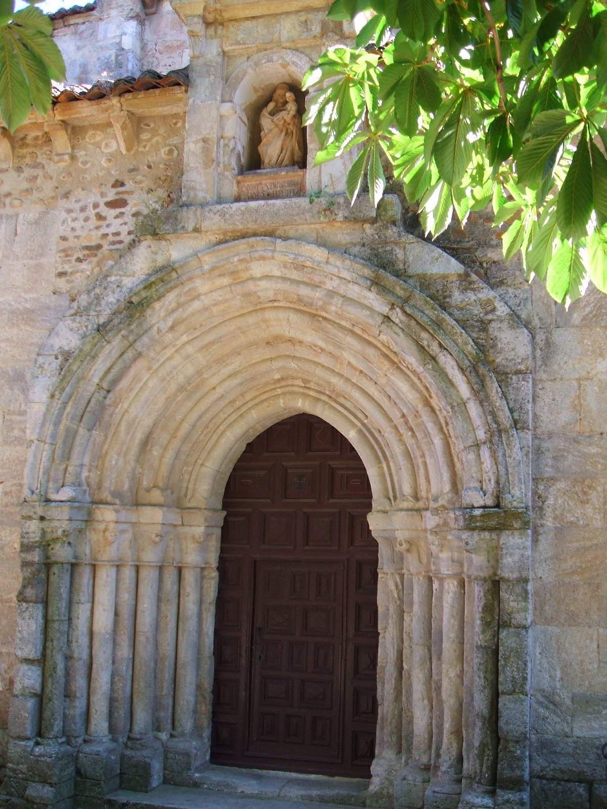 Portada de estilo cisterciense de la iglesia del Monasterio trapense de Santa María de Carrizo, en Carrizo de la Ribera (León)